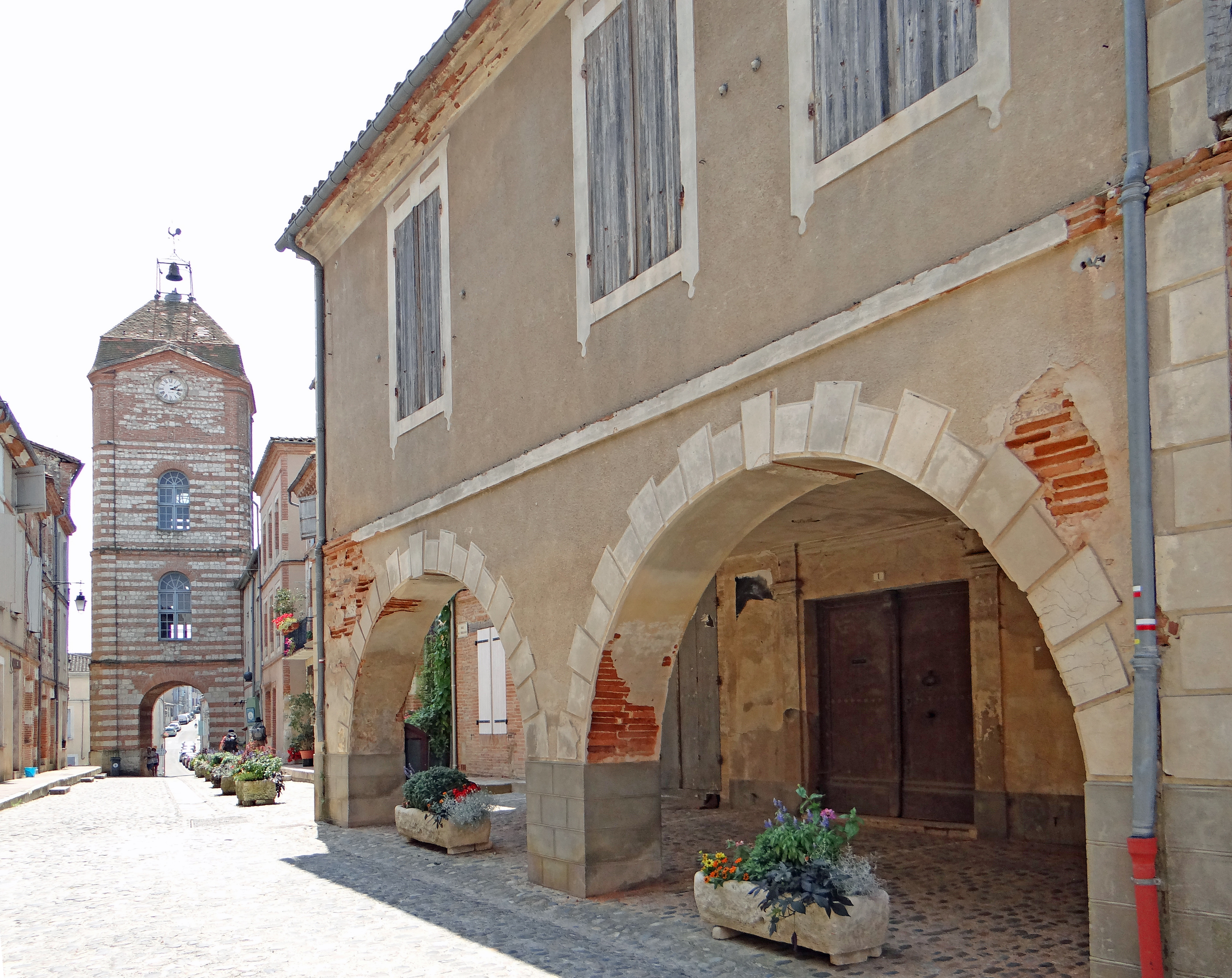 Auvillar - Place de la Halle-aux-Grains - Façade de l'immeuble n°1, rue et porte de l'Horloge